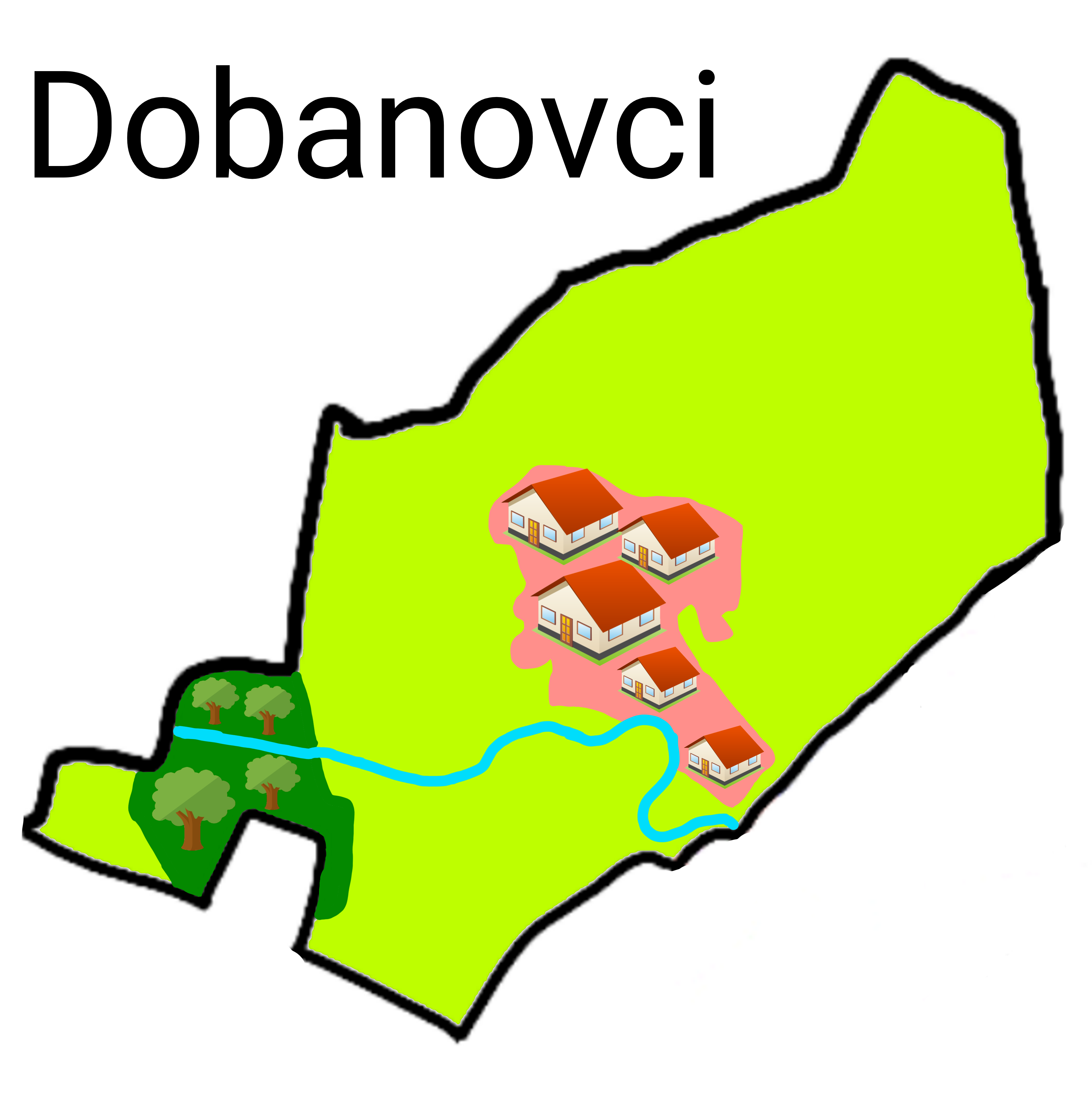 Srpski (latinica): Mapa sela i mesne zajednice Dobanovci